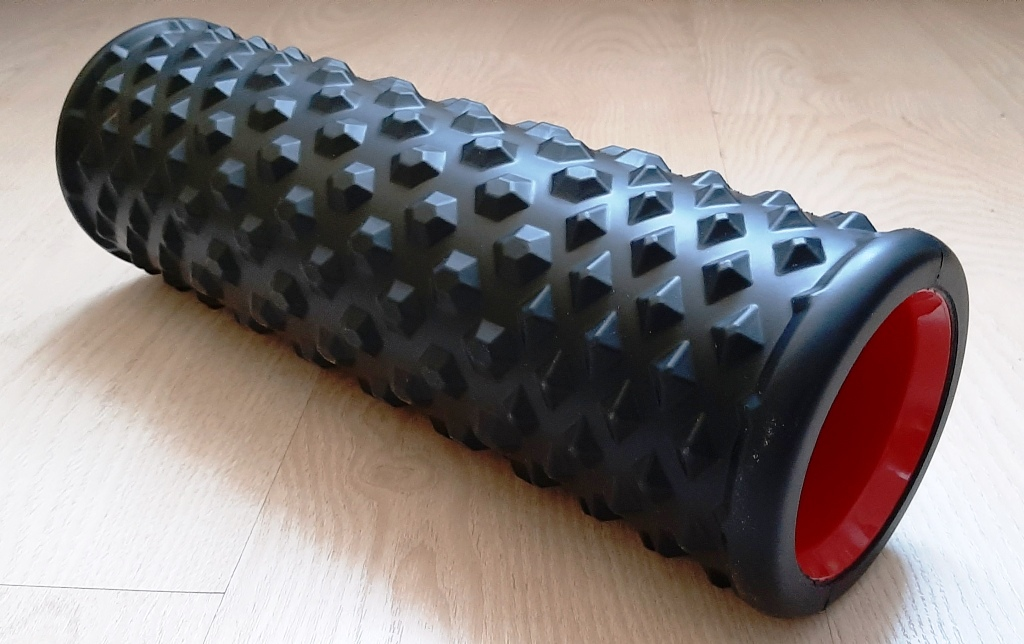 Wałek do masażu Schaumstoffwalze Schaumwalze Foam roller